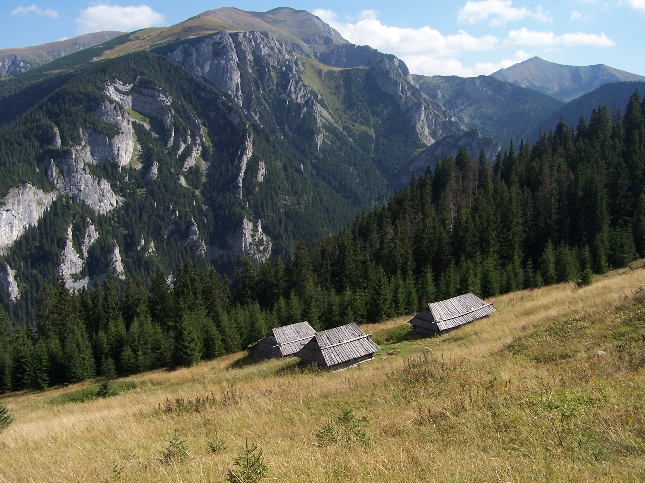 Hala Stoły, Ciemniak, Dolina Kościeliska